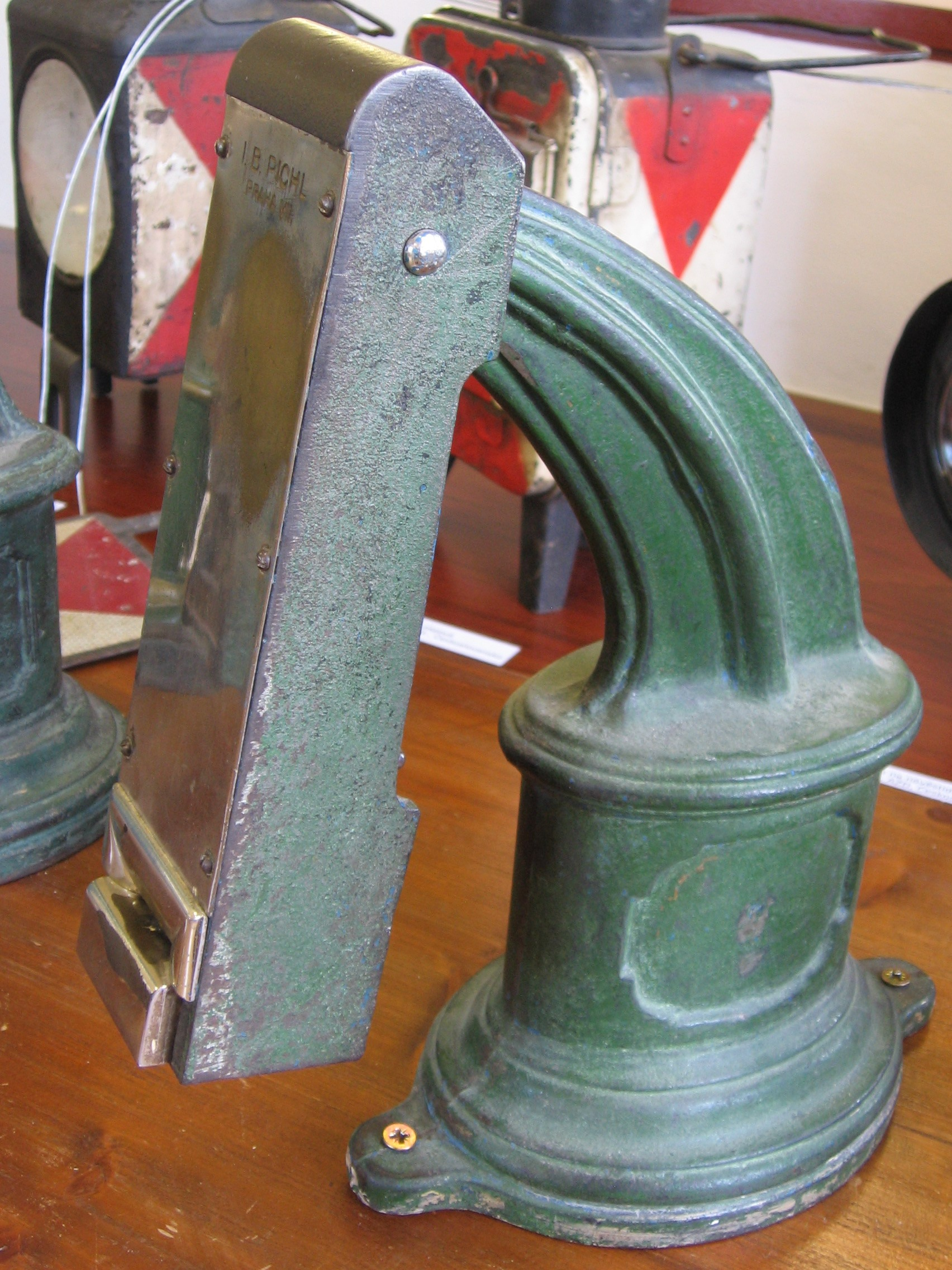 Kompostér firmy Pichl na zámku Chvaly (Praha).